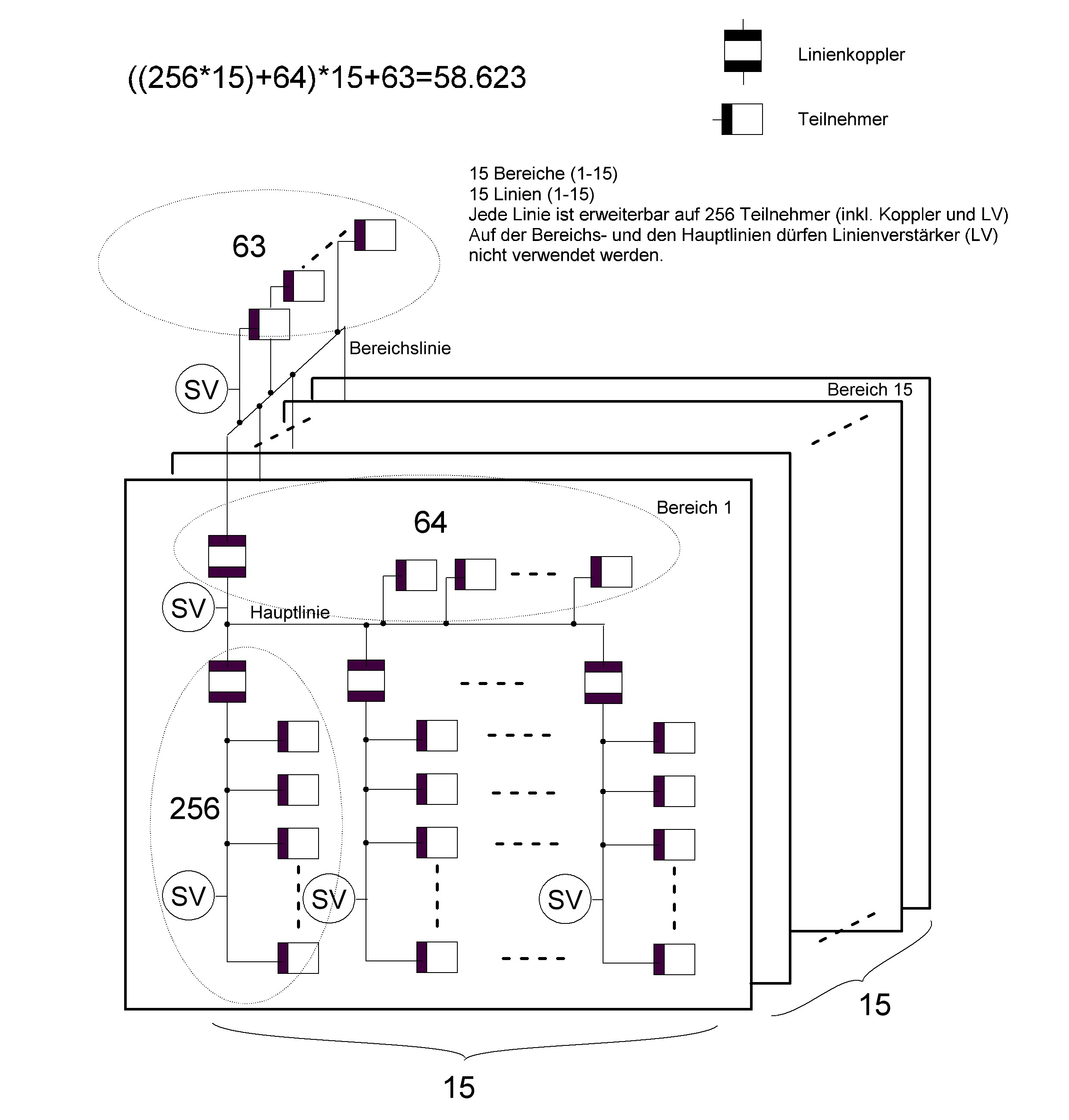 Maximale Ausbaustufe der KNX-Topologie